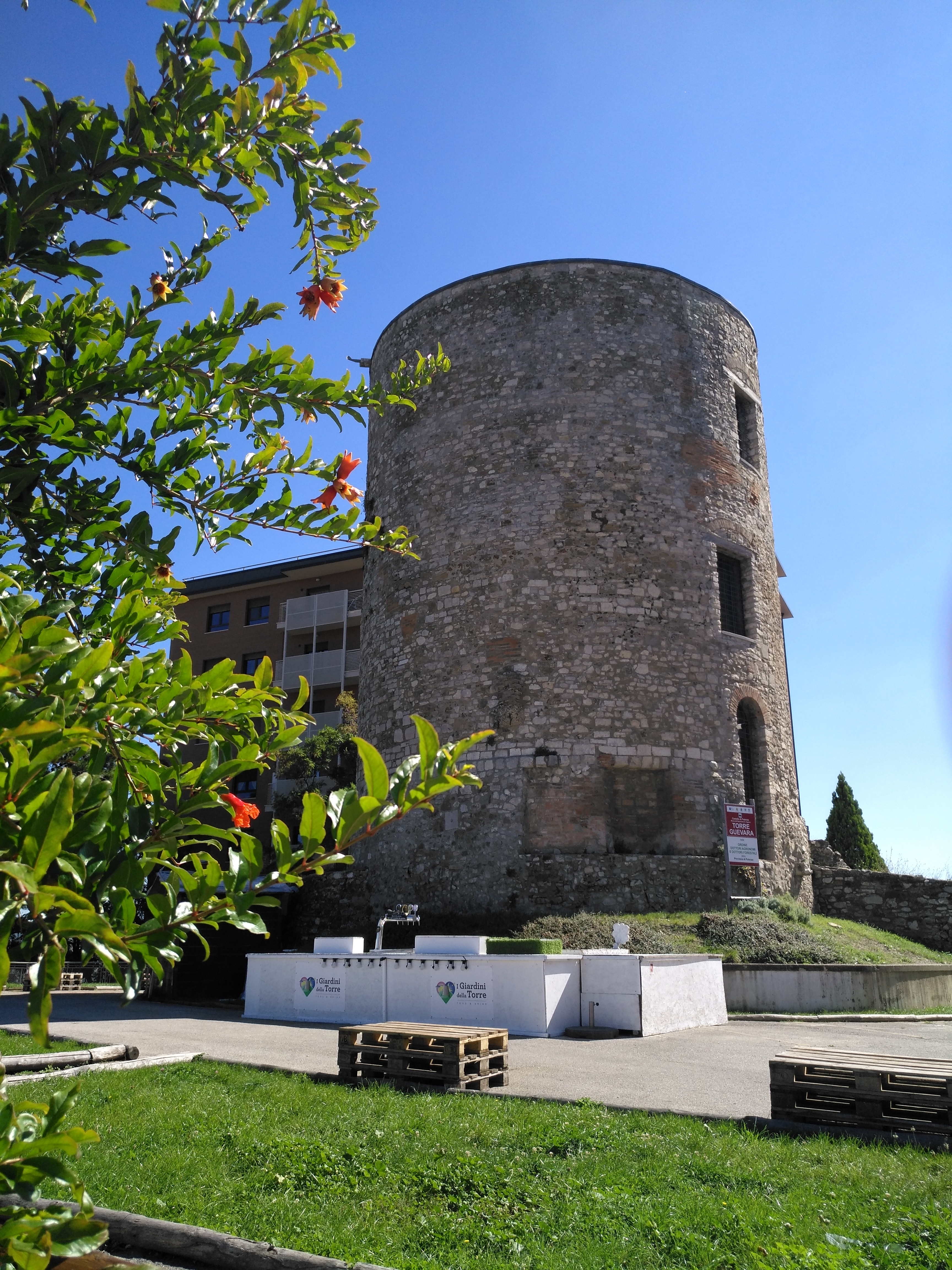 Potenza, Torre Guevara This is a photo of a monument which is part of cultural heritage of Italy.